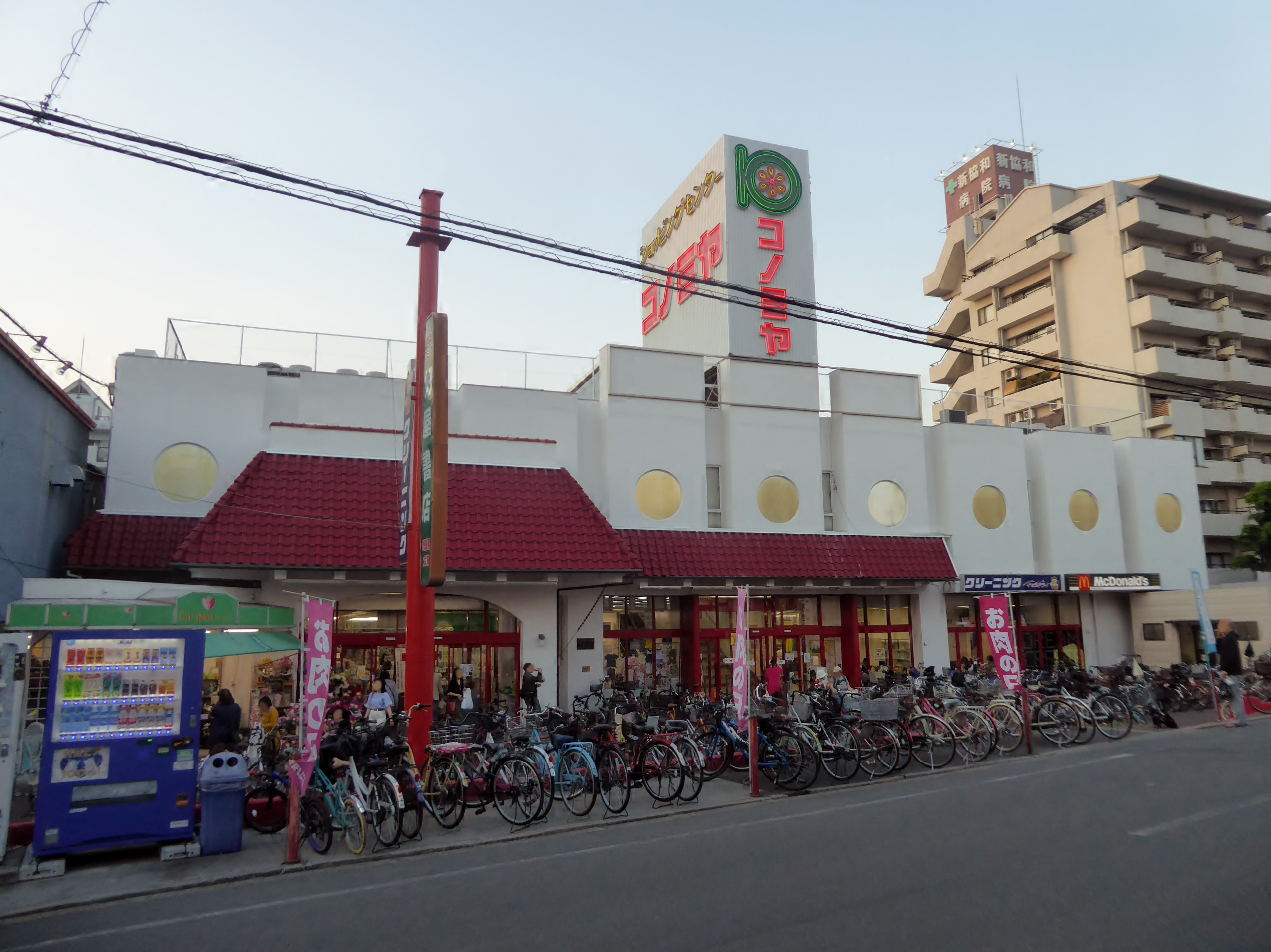 コノミヤ放出店を撮影。